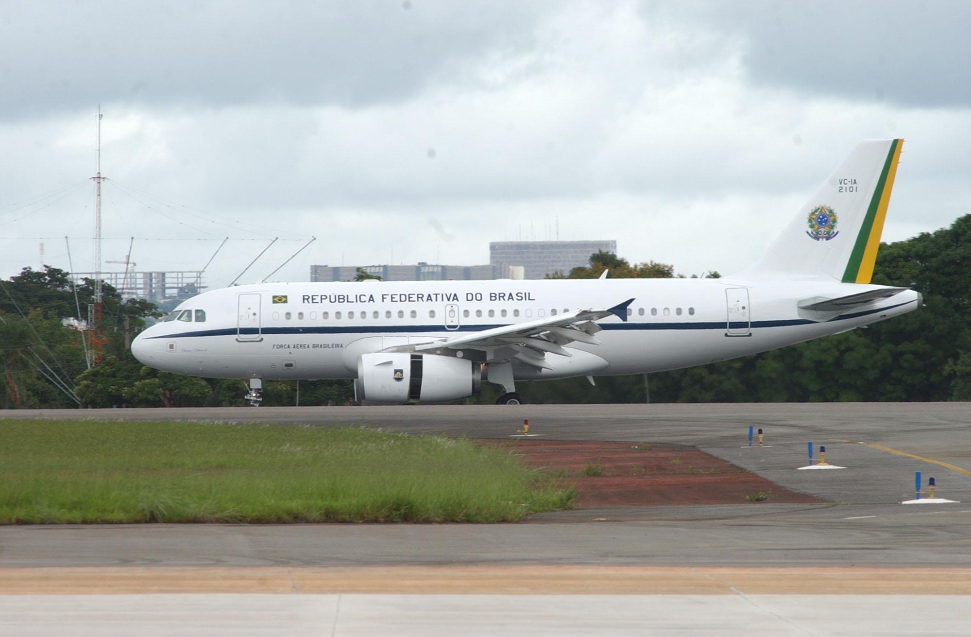 A Aeronave presidencial (FAB 001; Aerolula) brasileira.